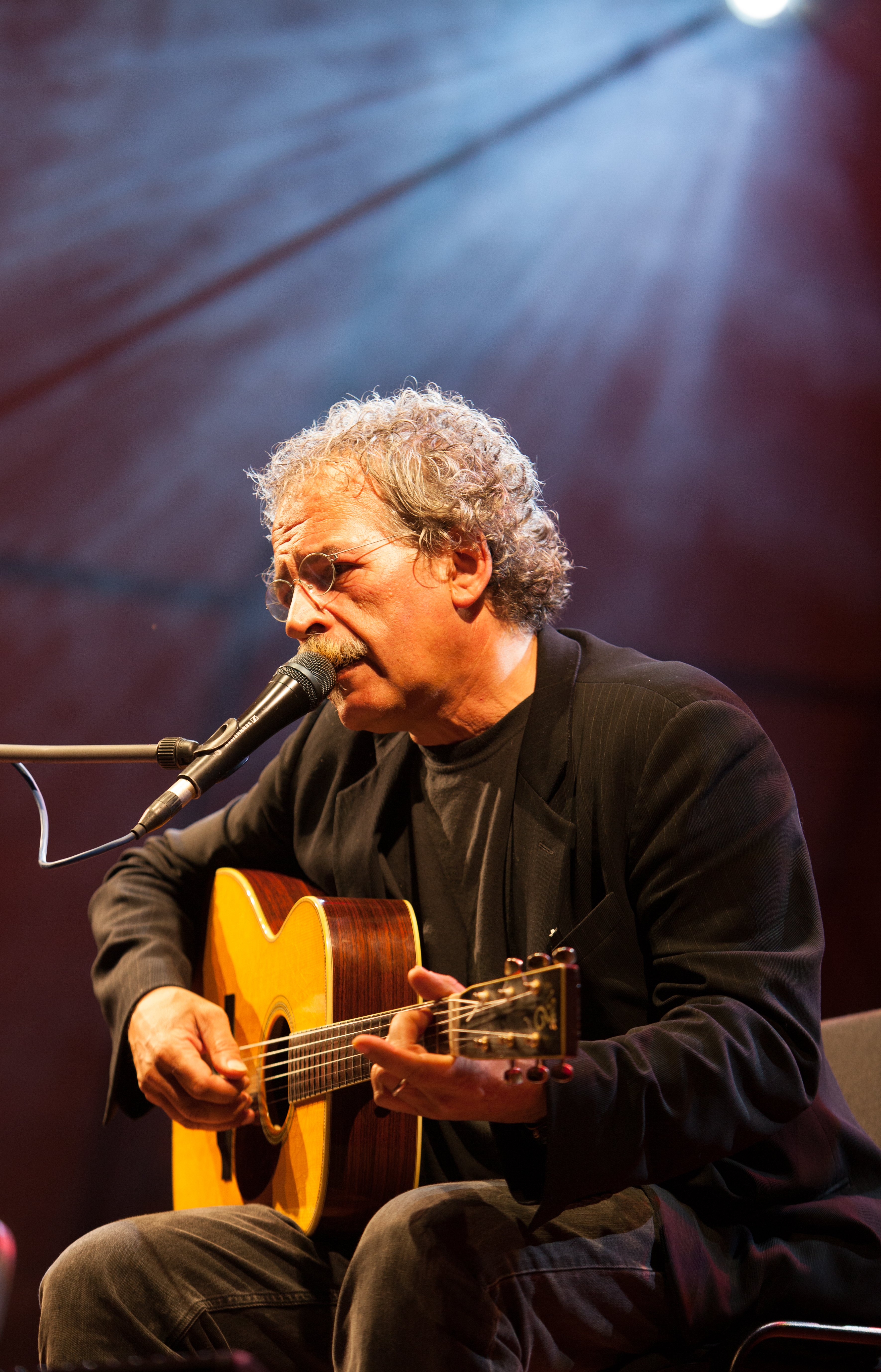 Il cantautore Gianmaria Testa in Rudolstadt 2013 Der Liedermacher Gianmaria Testa beim TFF Rudolstadt 2013